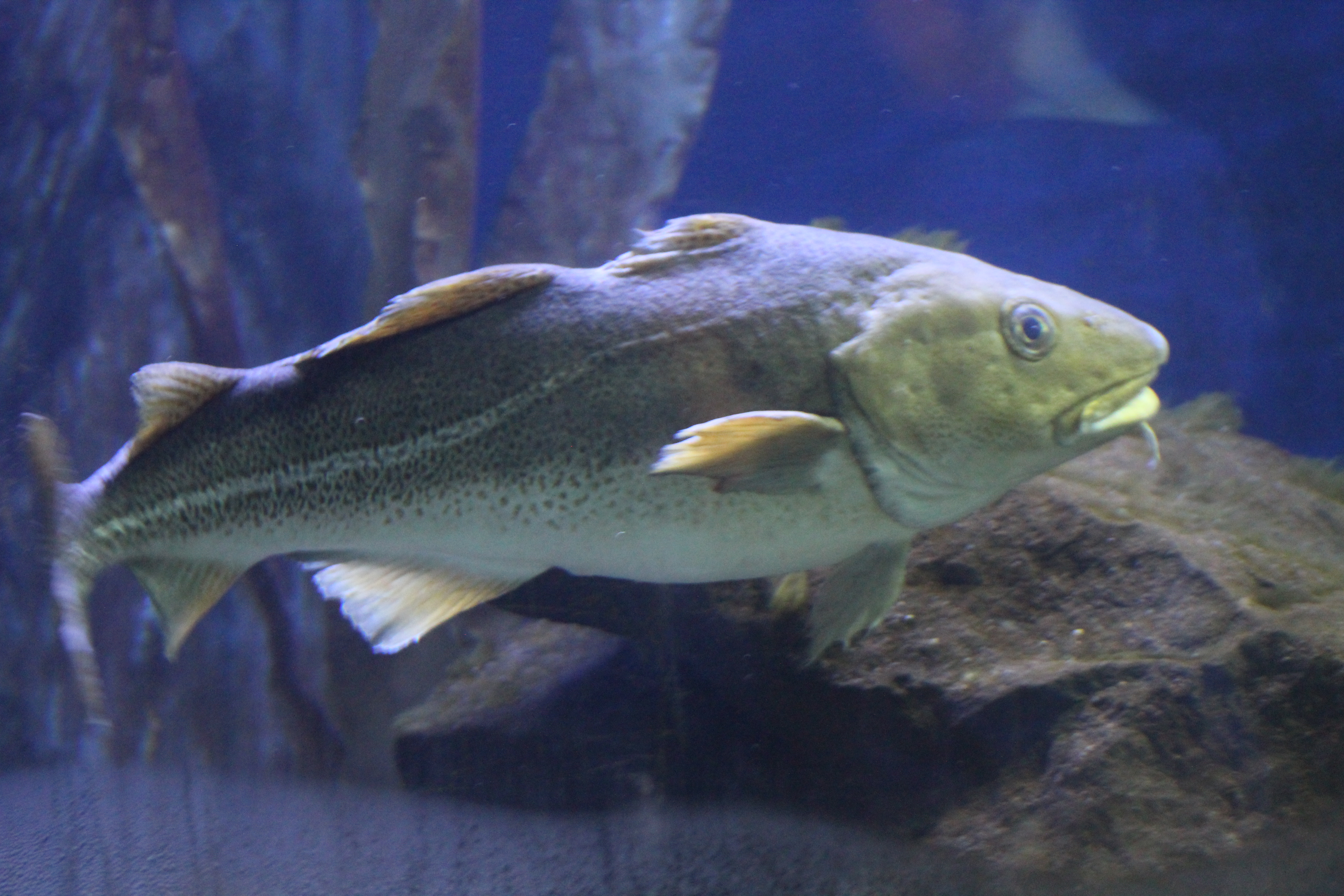 Une morue photographier à l'aquarium de Québec en septembre 2019